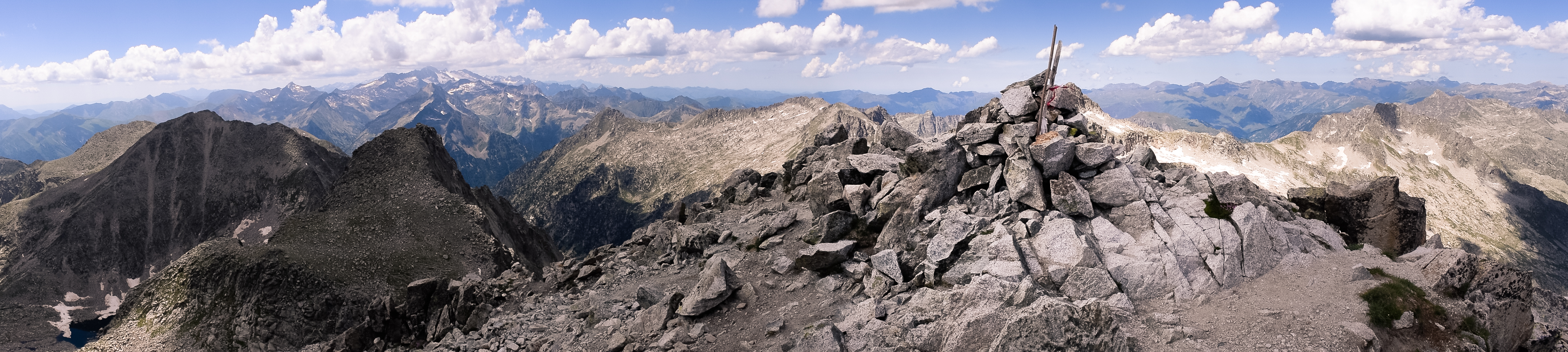 Cima del Besiberri Sud (3.030m) y Macizo de la Maladeta y el Aneto (3.404m) al fondo.